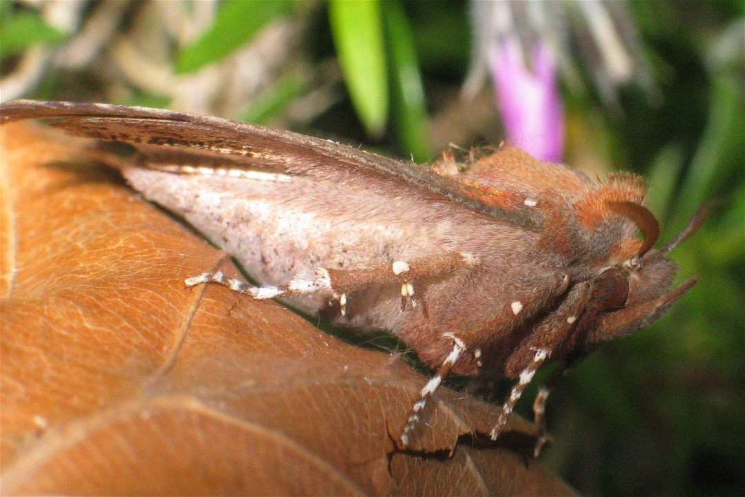 Zackeneule, auch Zimteule genannt (Scoliopteryx libatrix)